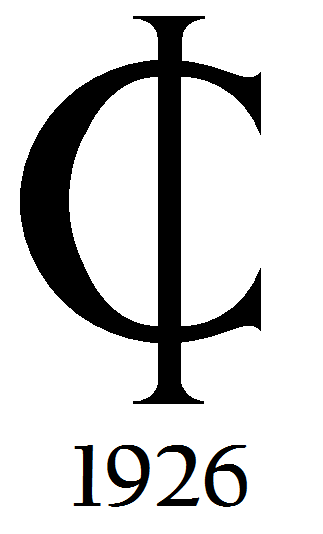 Anagrama de la colonia industrial en la alcaldía Gustavo A. Madero, Ciudad de México